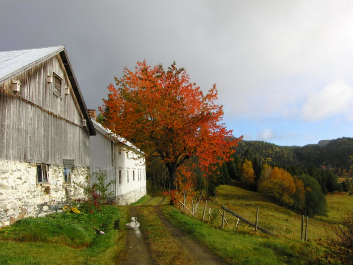 Gården Hafella ved Tørstadvatnet, Tørstad.